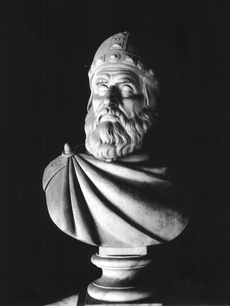 Busto di Enrico Dandolo, opera di Antonio Bianchi precedente al 1847. Il busto fa parte del Panteon Veneto, conservato presso Palazzo Loredan di Campo Santo Stefano a Venezia.